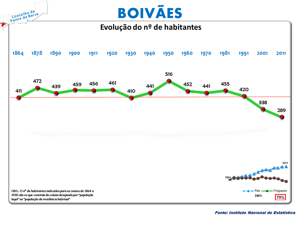 Censos 1864/2011